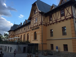 Tátralomnic, a Lomnic szálló